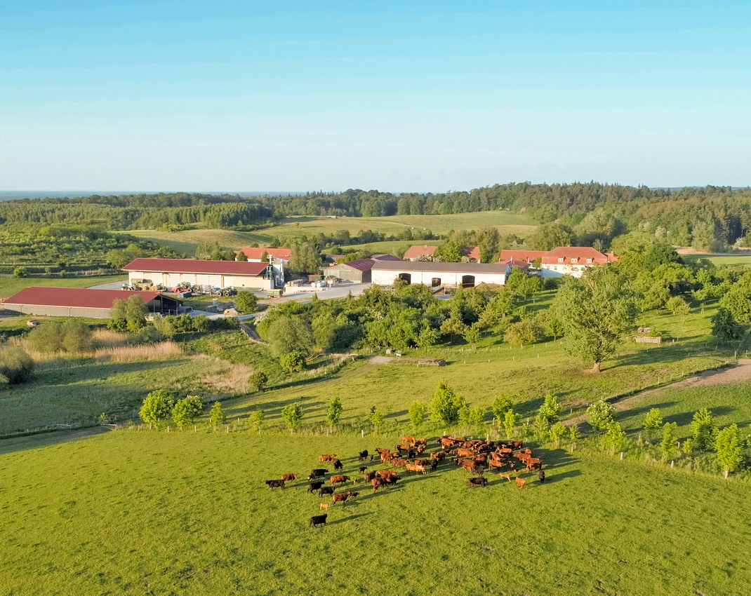 Foto von Gut Klepelshagen